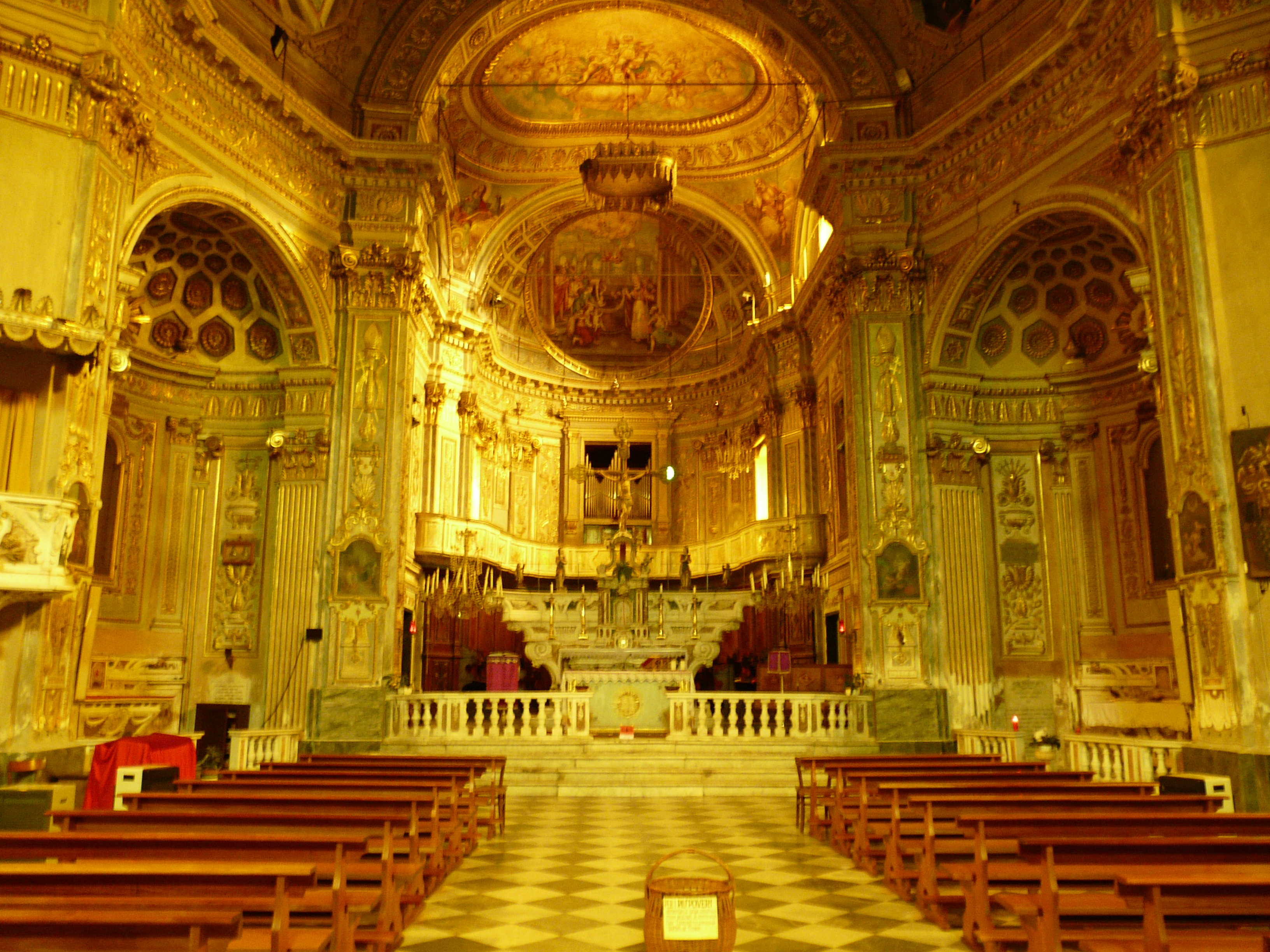 Chiesa di San Nicolò, Calice Ligure, Liguria, Italia